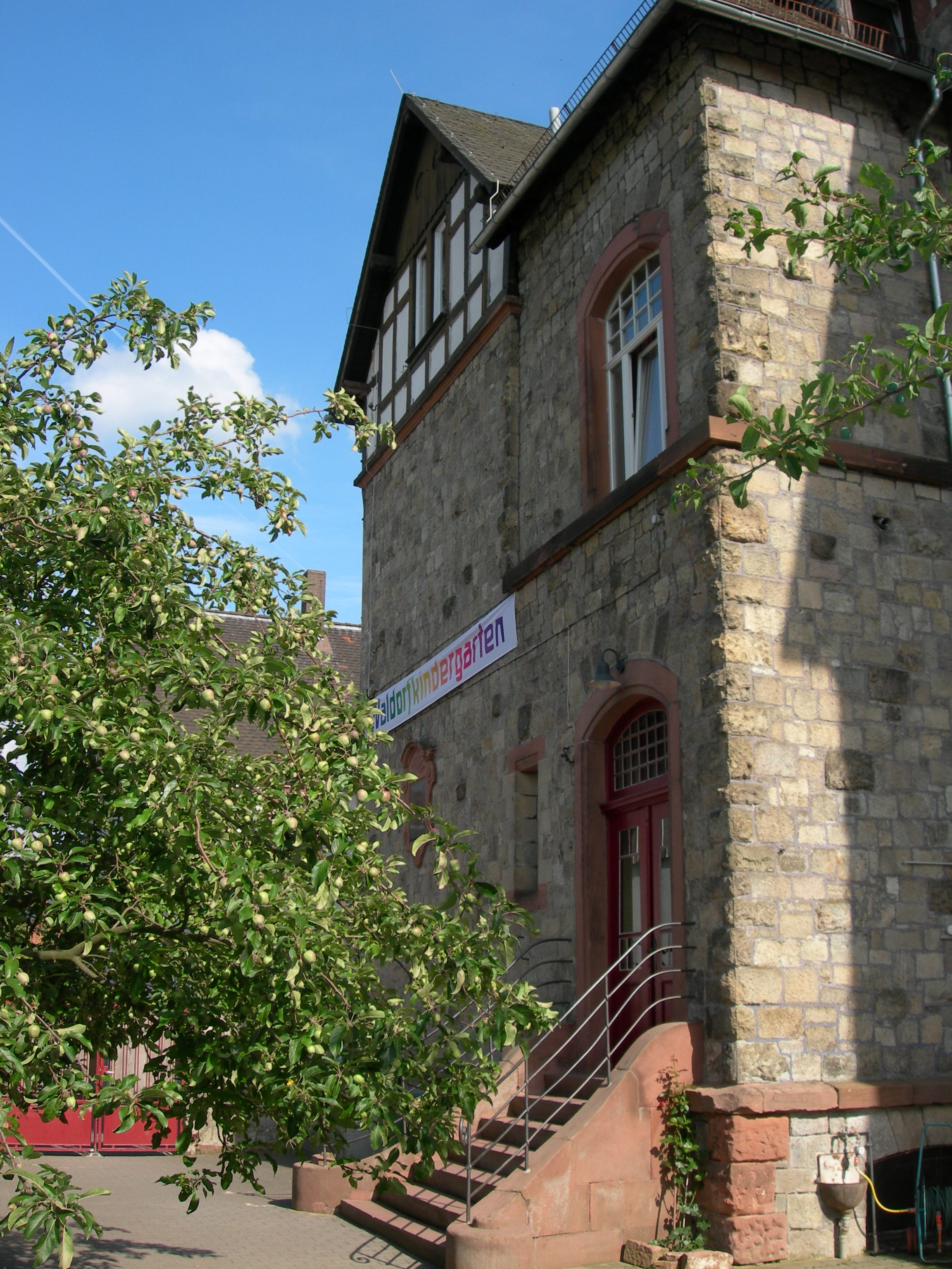 valdorfa infanĝardeno de Groß-Umstadt en Hesio (Germanio) Fonto: propra foto